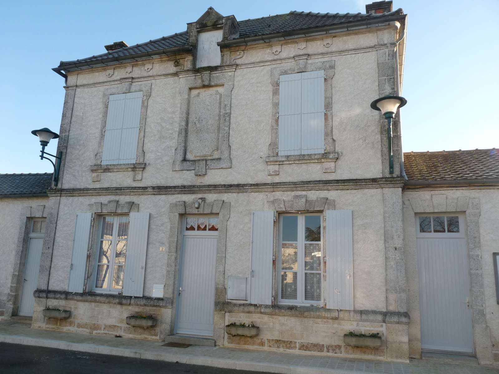 mairie de St-Groux, Charente, France